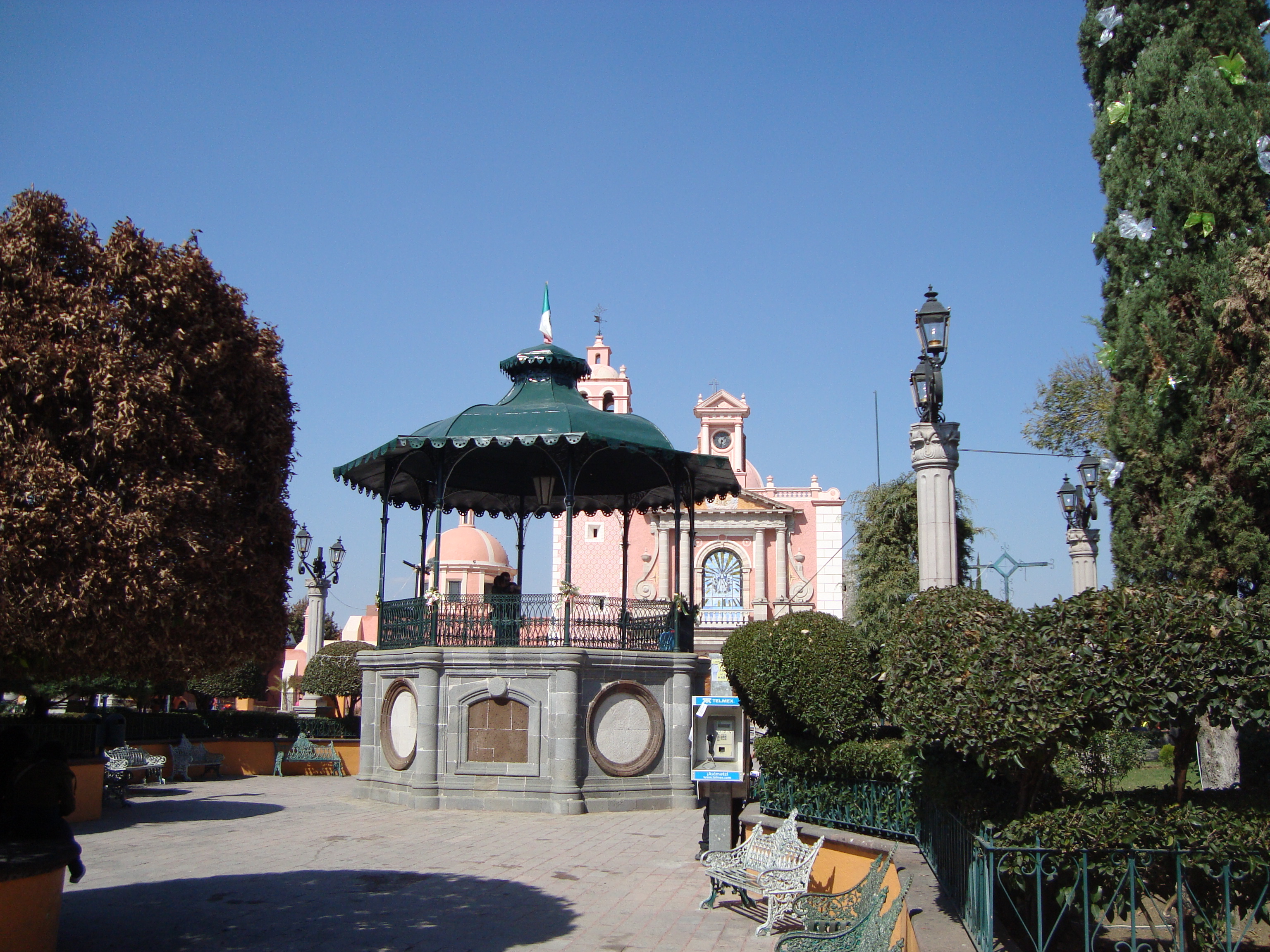 La foto montras la centran placon (Zócalo) de Tequisquiapán.